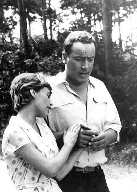 Zentralbild-DEFA Ge-At. AV v. 14.1.1963 Der DEFA-Film "Beschreibung eines Sommers"... nach dem Roman von Karl-Heinz Jakobs, wird als Beitrag zum VI. Parteitag der SED am 15.1.1963 im Berliner Colosseum uraufgeführt. Christel Bodenstein und Manfred Krug spielen die Hauptrollen. Regie führte Ralf Kirsten. UBz.: Eine Szene aus dem Film. Christel Bodenstein als Grit und Manfred Krug als Tom."